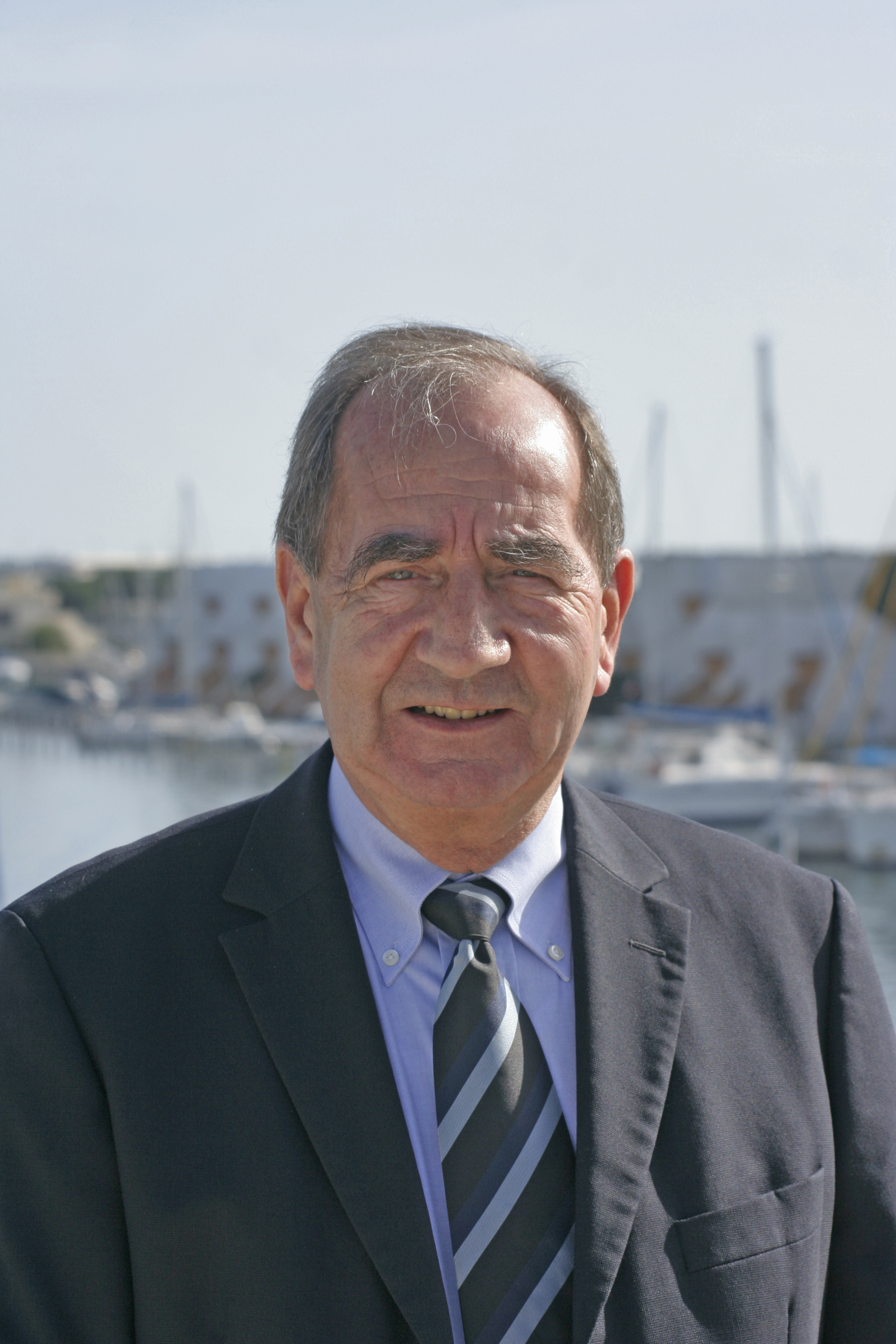 Etienne MOURRUT, député de la 2ème circonscription du Gard et maire de Le Grau-du-Roi à Port-Camargue